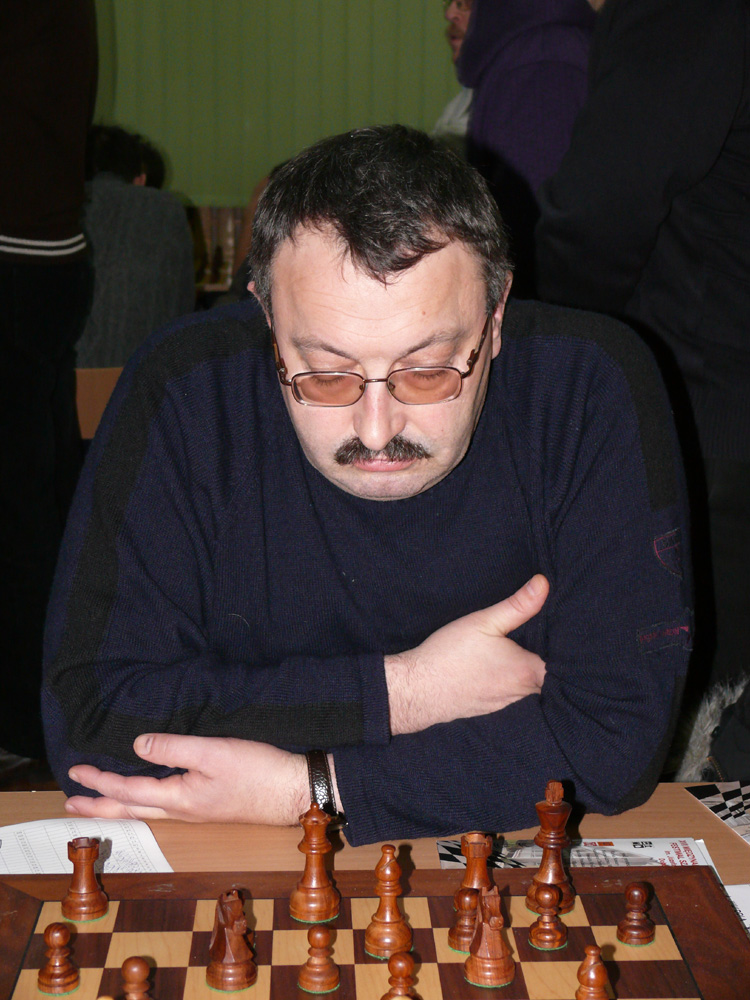 GM Vladimir Malaniuk Ukraine, Cracow 2009